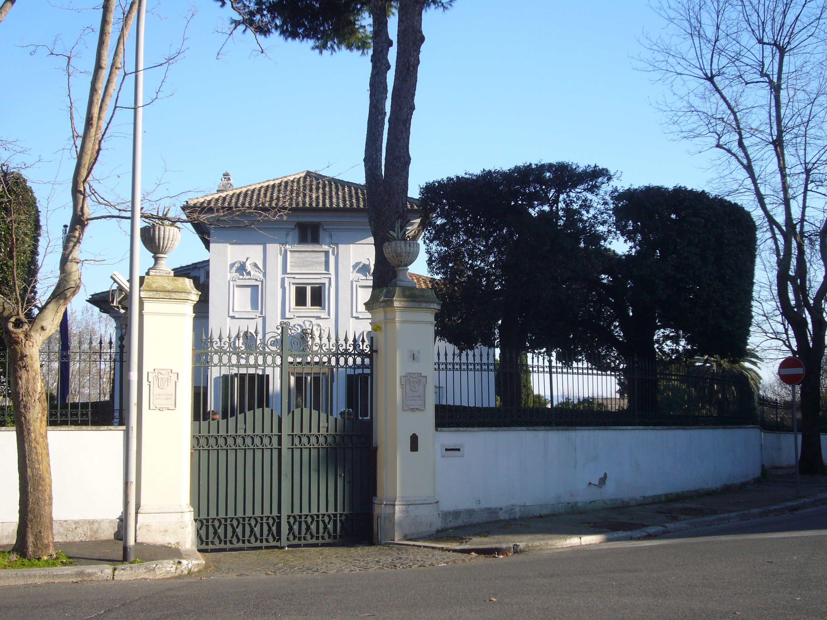 Roma, via Giacomo Medici, Villa Spada (già villa Nobili), sede dell'Ambasciata d'Irlanda.